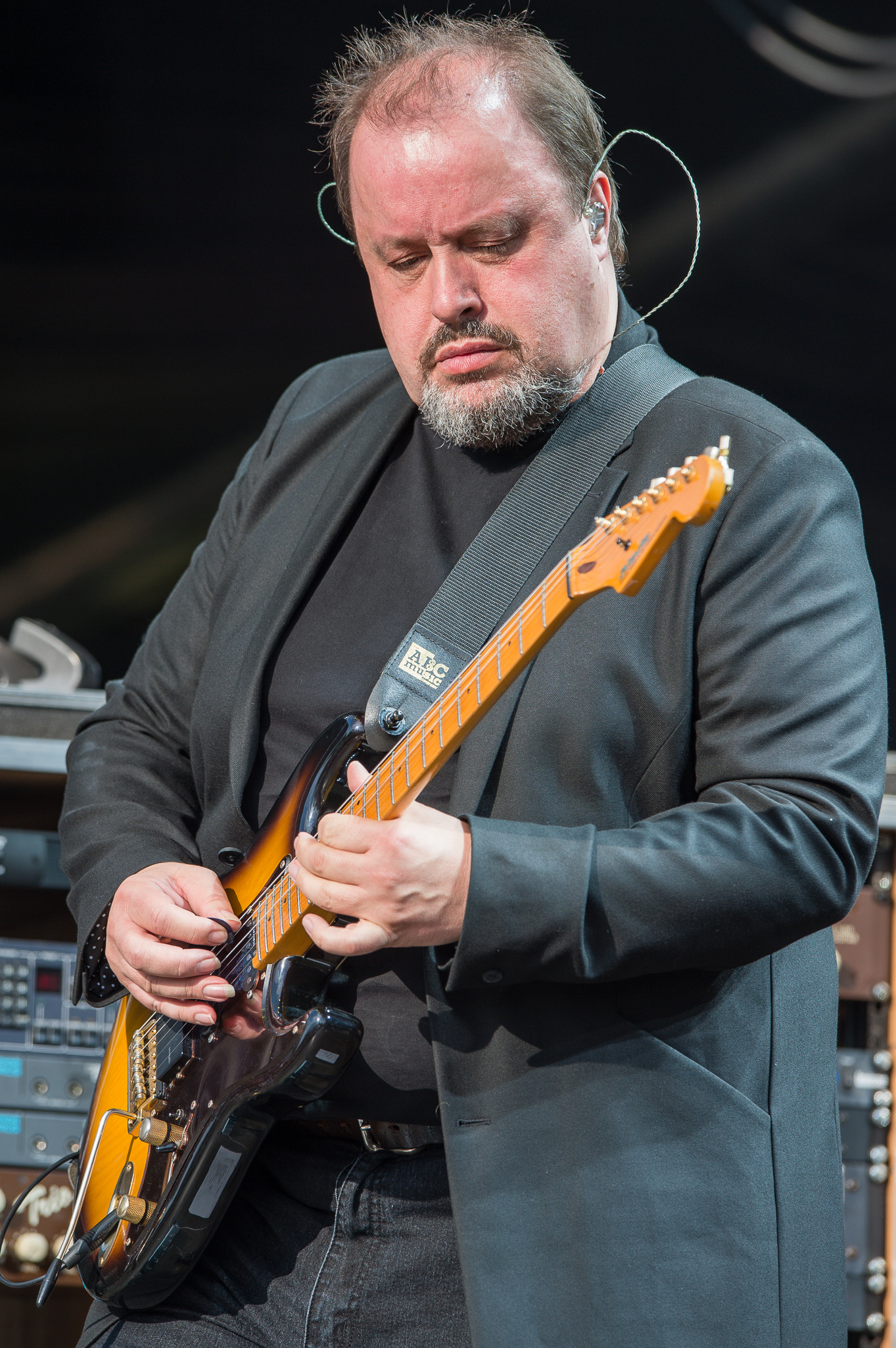 Brombachsee,Concertbüro Franken,Festival,Konzert,Lieder am See,Livekonzert,Livemusik,Marillion,Musik,Steve Rothery